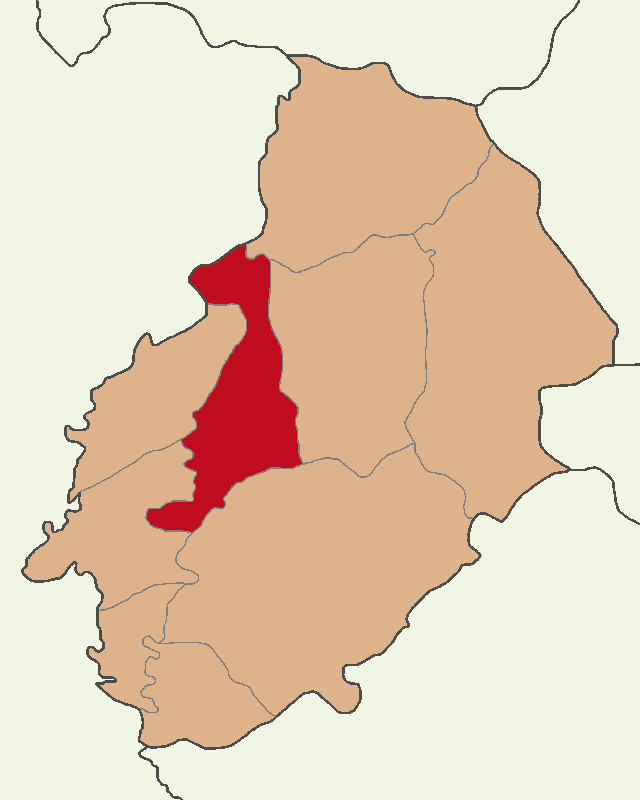 Kırıkkale Merkez ilçesinin konumu